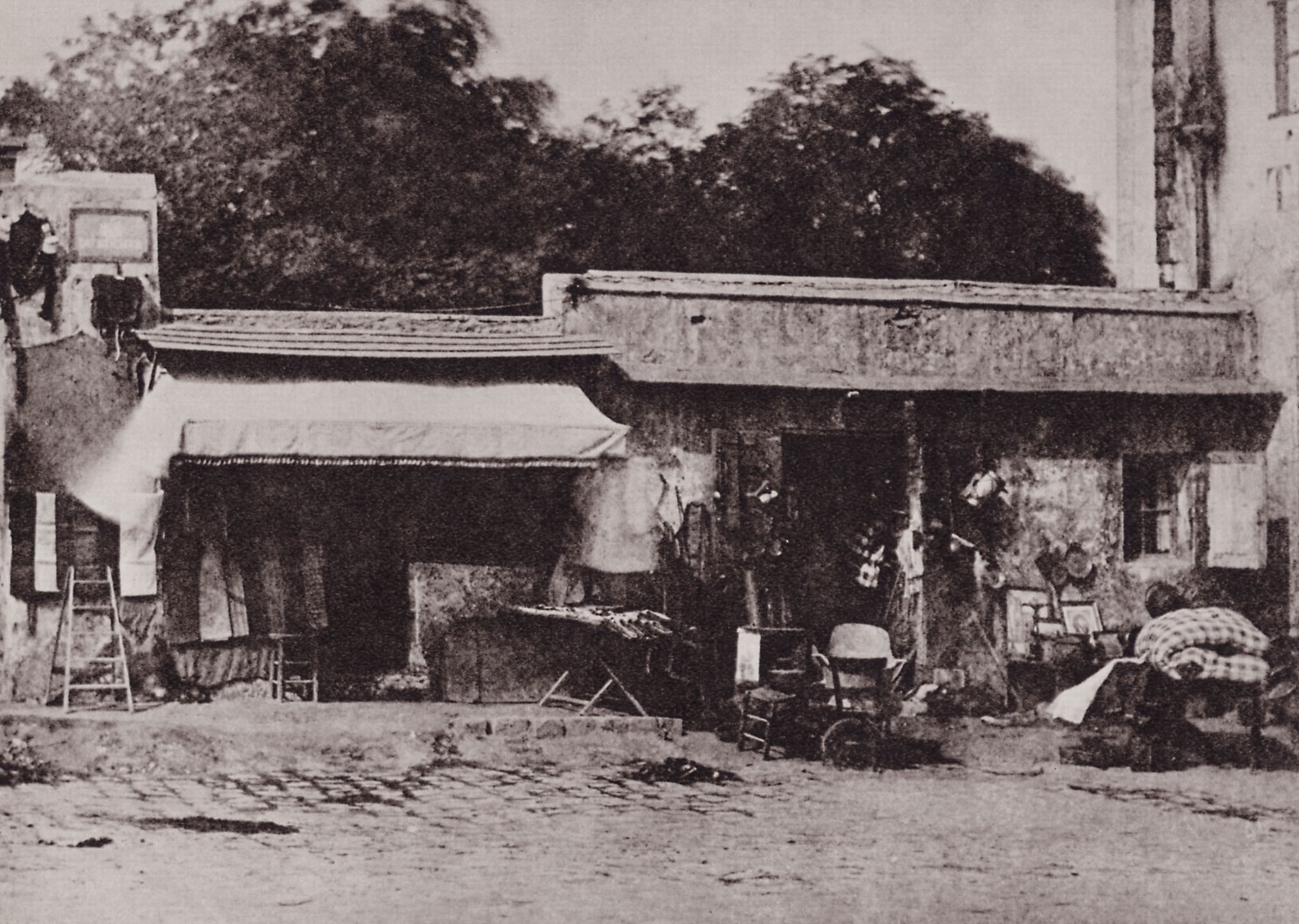 Bayard, Hippolyte: Trödlerbude an der Rue du Rocher